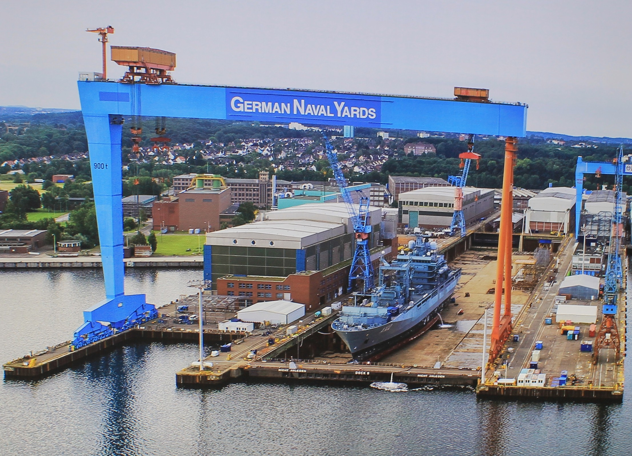 German Naval Yards, Kiel